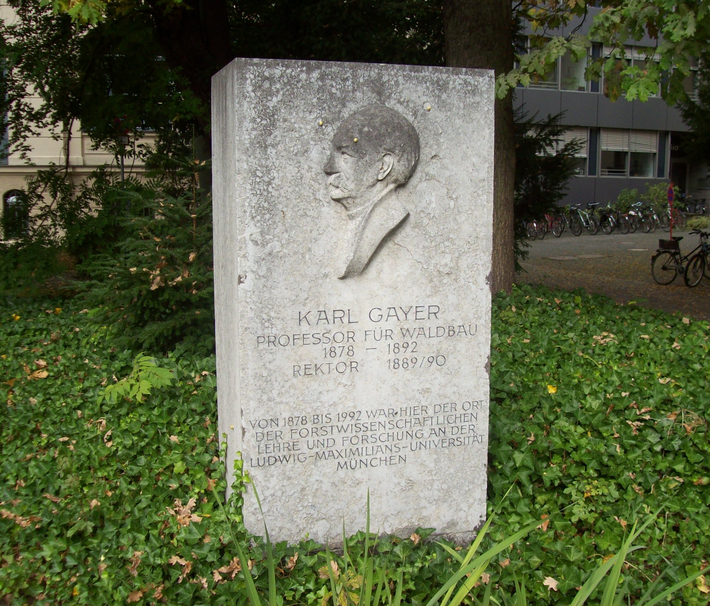 Denkmal für Karl Gayer im Salinenhof der Ludwig-Maximilians-Universität München